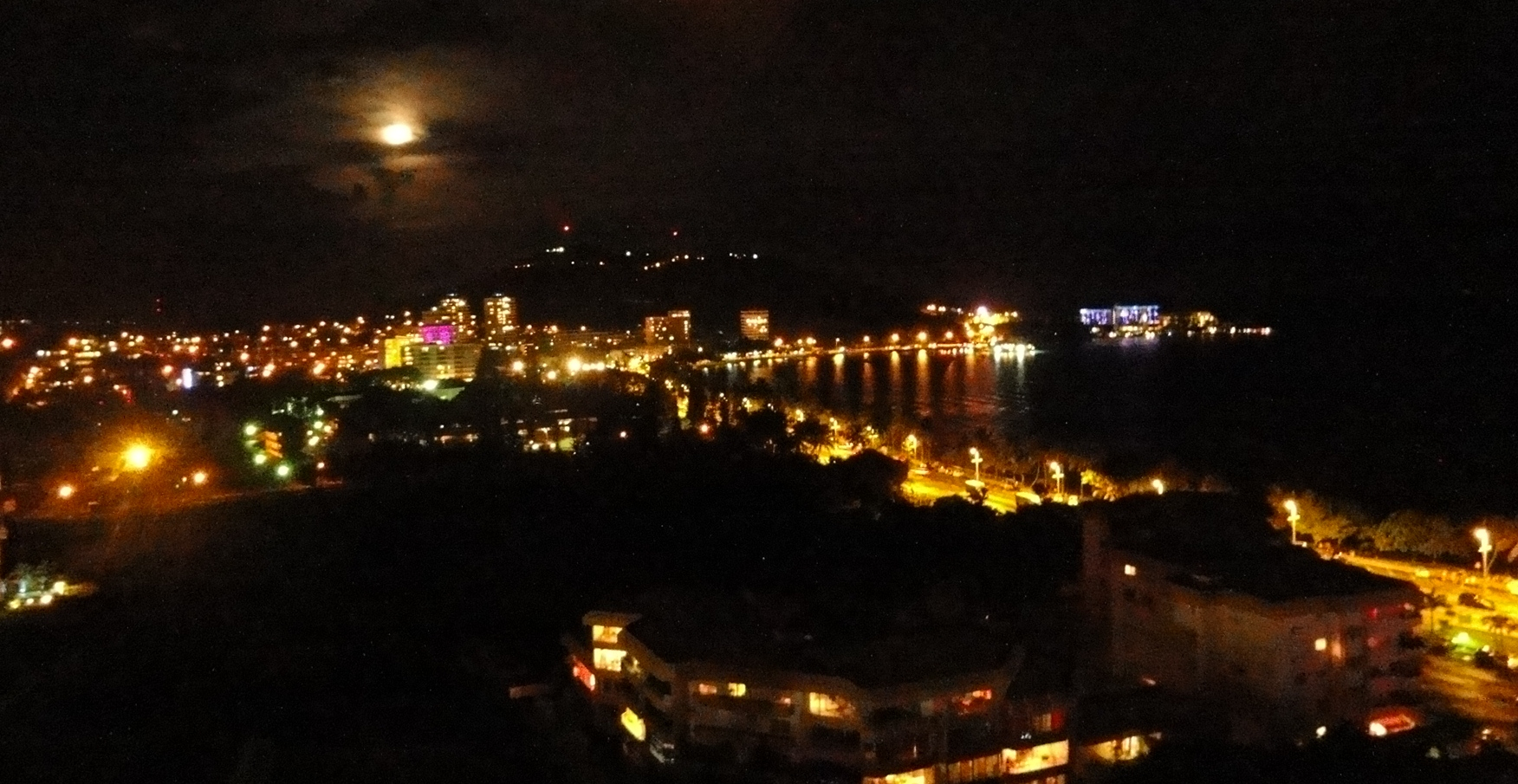 Baie de l'Anse Vata de nuit